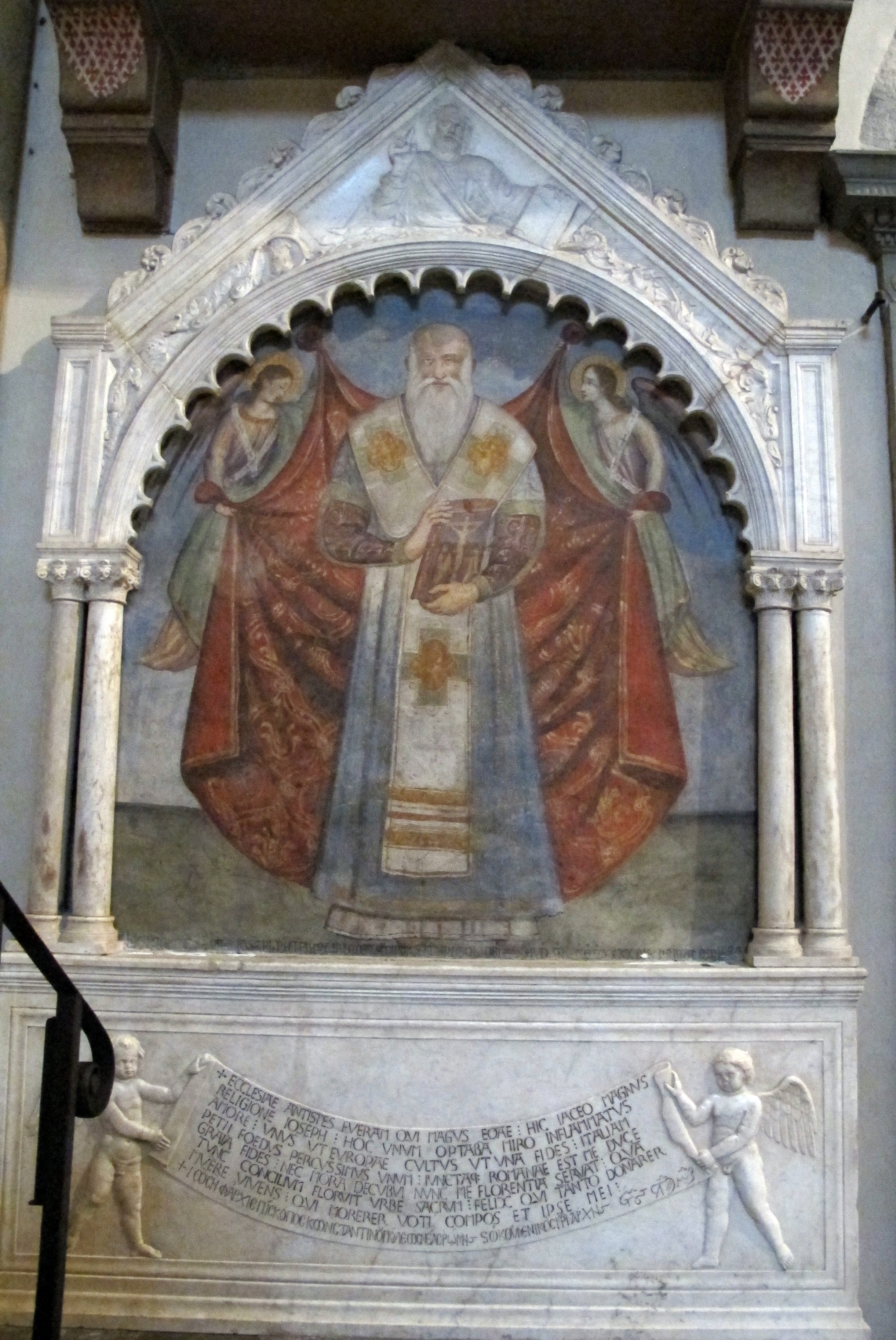 Smn, transetto dx, monumento al patriarca giuseppe di costantinopoli, 1440 ca., con effige del 1590-92